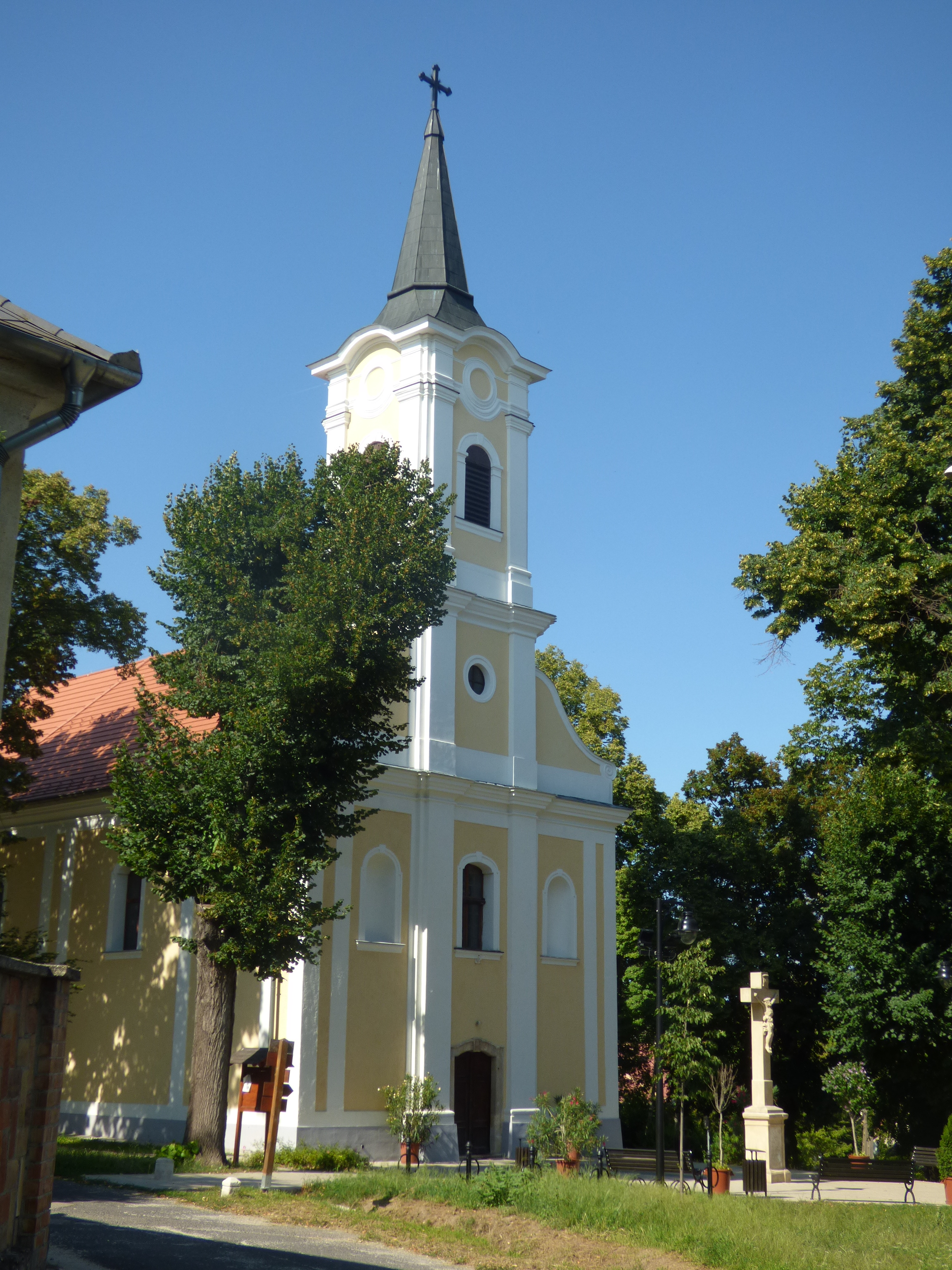 Mány katolikus temploma